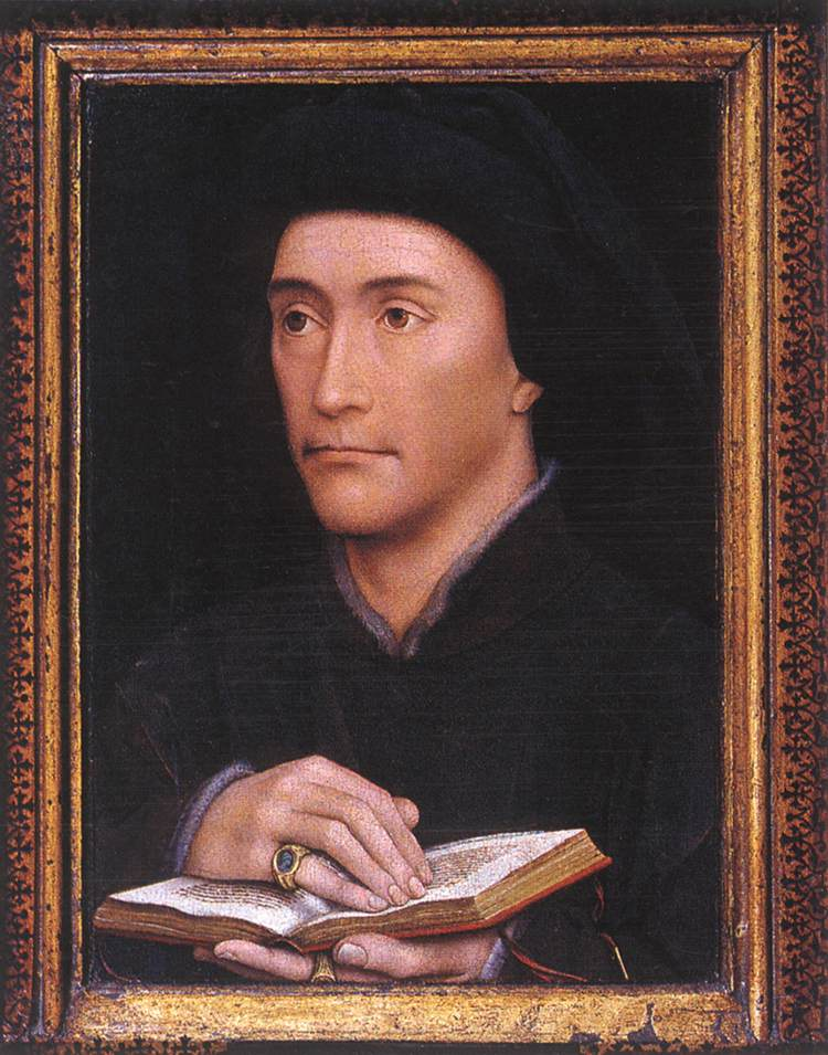 Vermutliches Porträt von Guillaume Fillâtre (1400-1473) [not his uncle and namesake, the cardinal!]